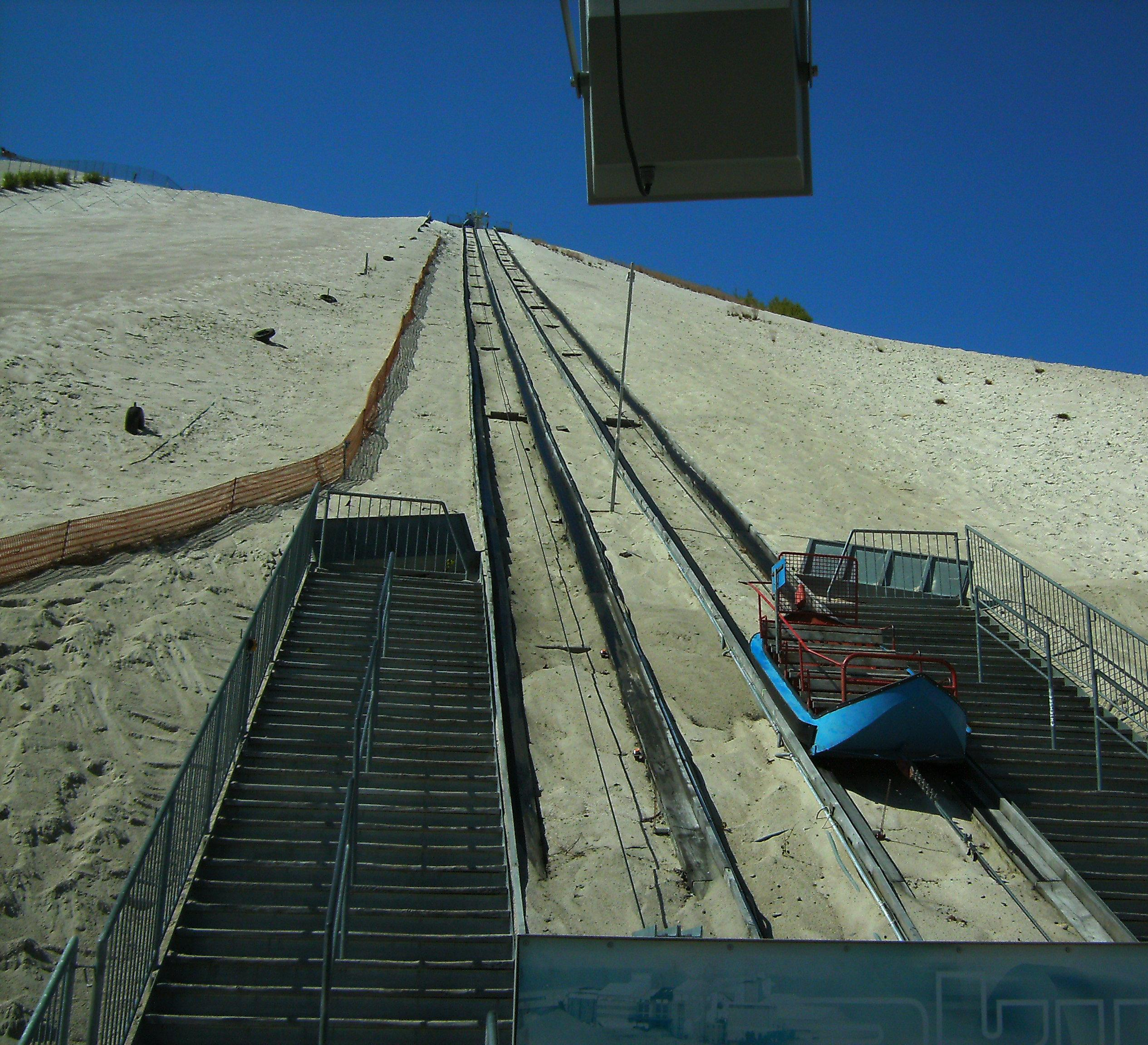 Standseilbahn auf dem Monte Kaolino bei Hirschau